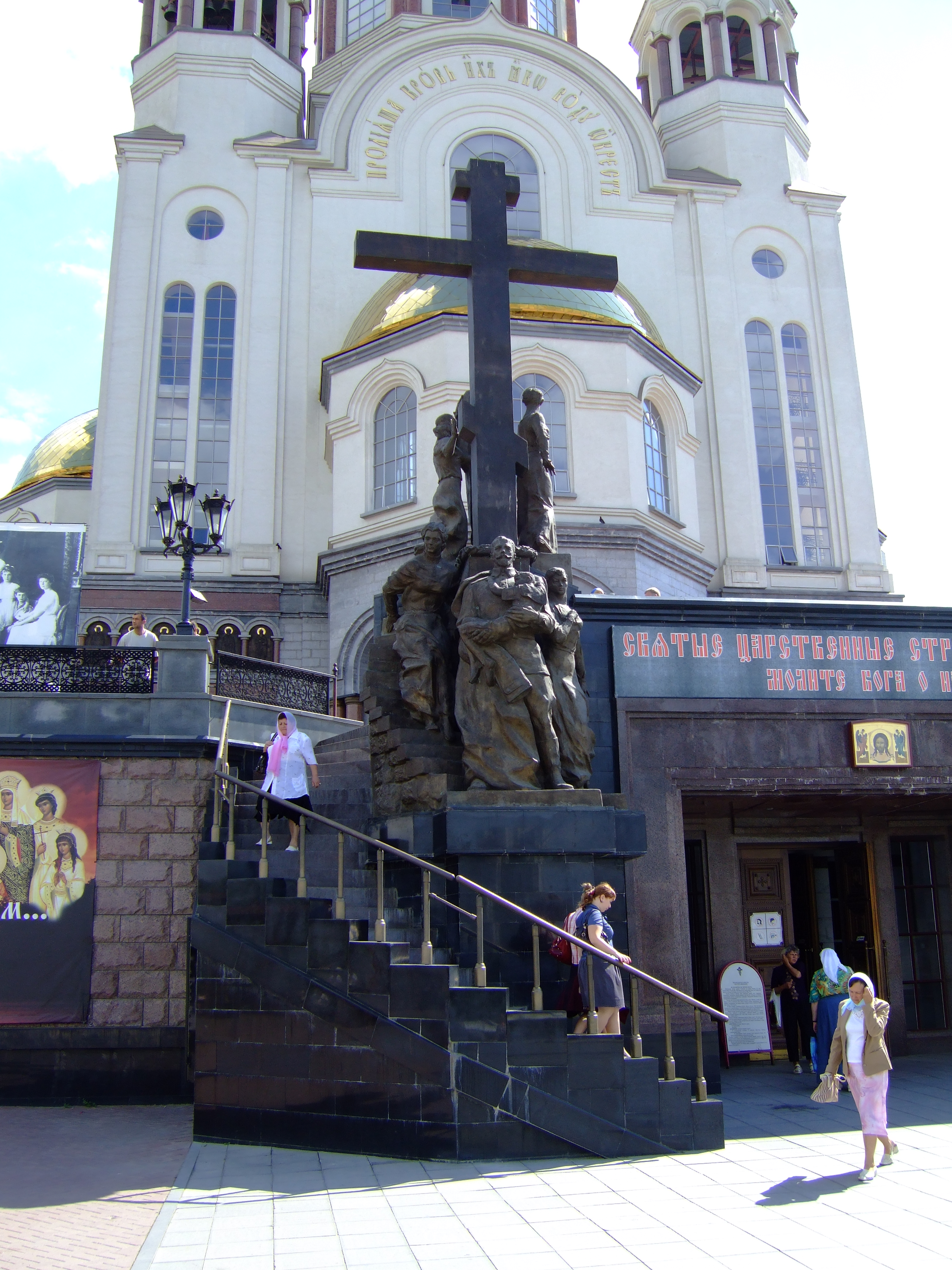 Monumento allo zar Nicola - Cattedrale sul Sangue - Ekaterinburg